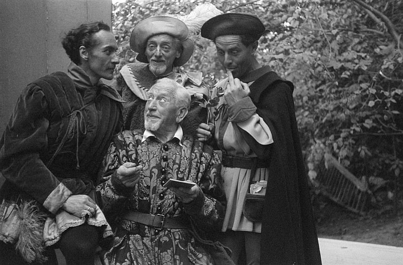 Original image description from the Deutsche Fotothek Szenenbilder